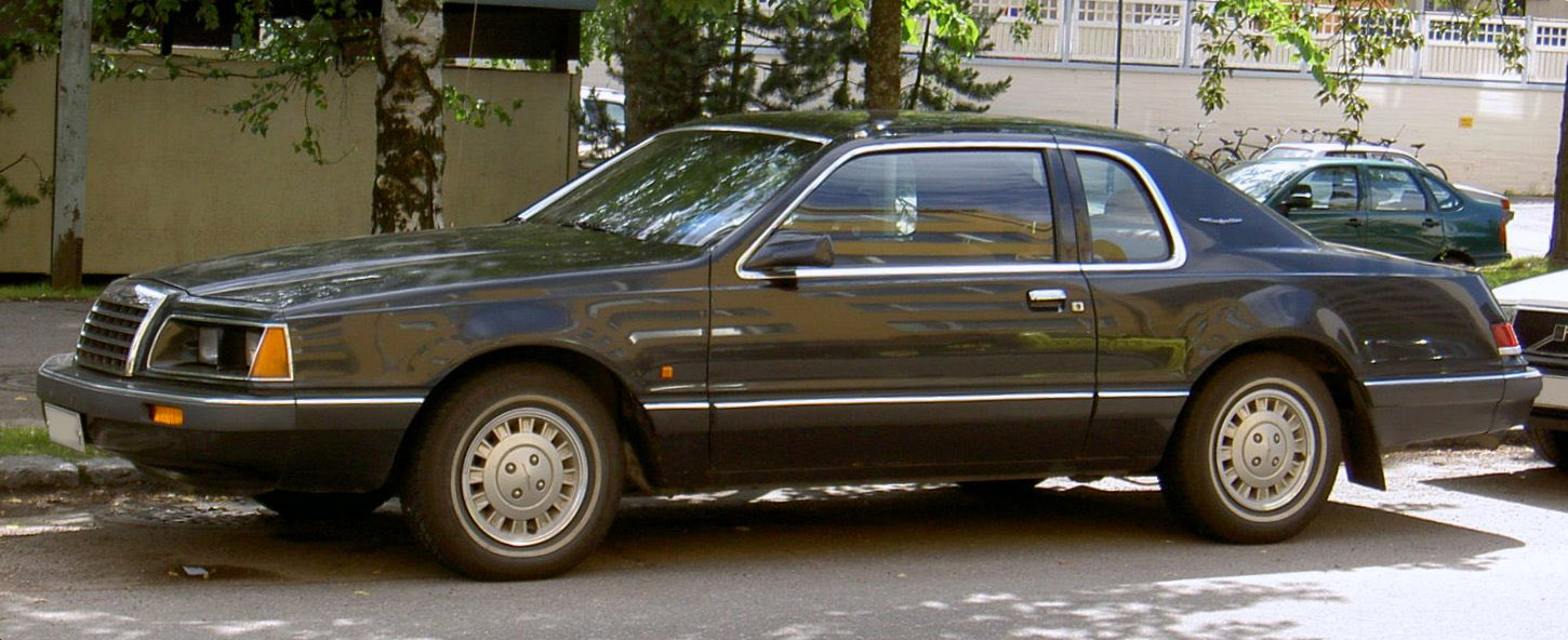 Ford Thunderbird 1983-1987 Aero Bird